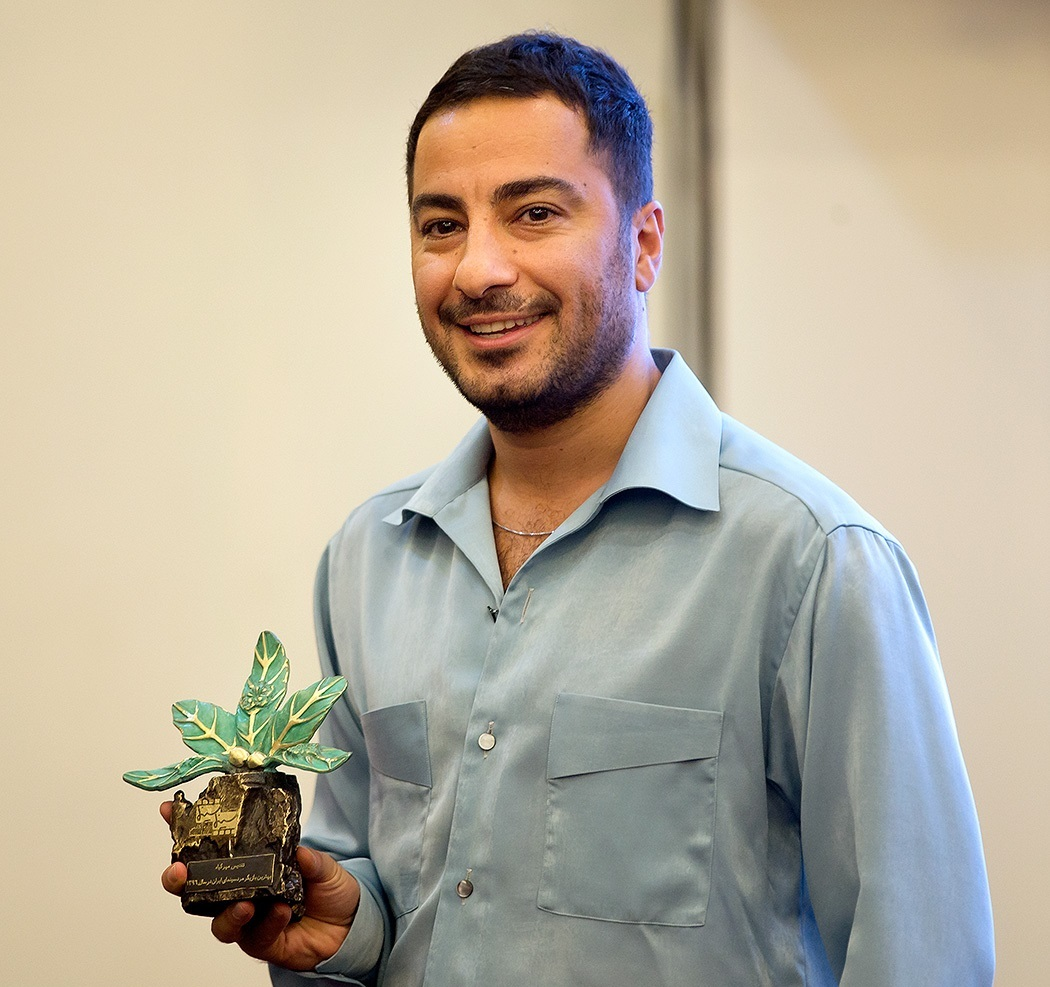 نخستین دوره جایزه «آکادمی سینما سینما» به ریاست کیانوش عیاری